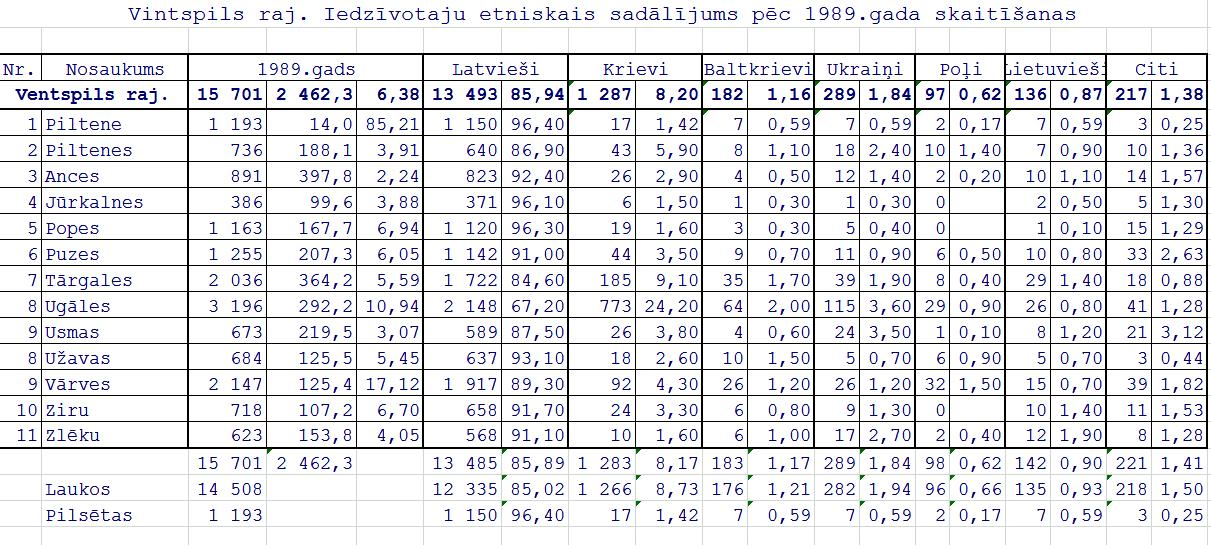 Этнический состав населения Латвии по переписи 1989 года